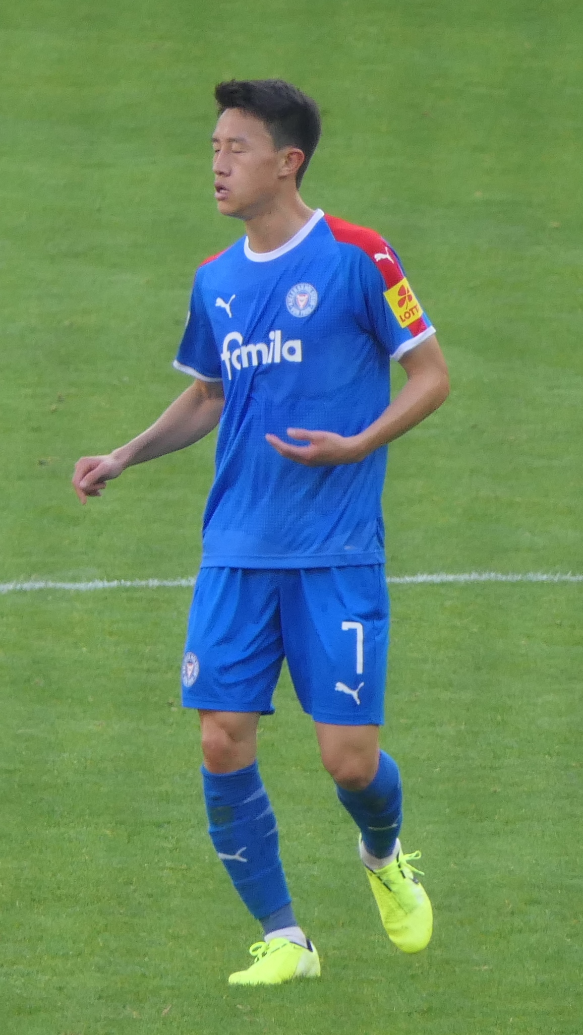 Der Fussballprofi Jae-Sung Lee im Trikot von Holstein Kiel beim Auswärtsspiel gegen den VfB Stuttgart am 20.10.2019.